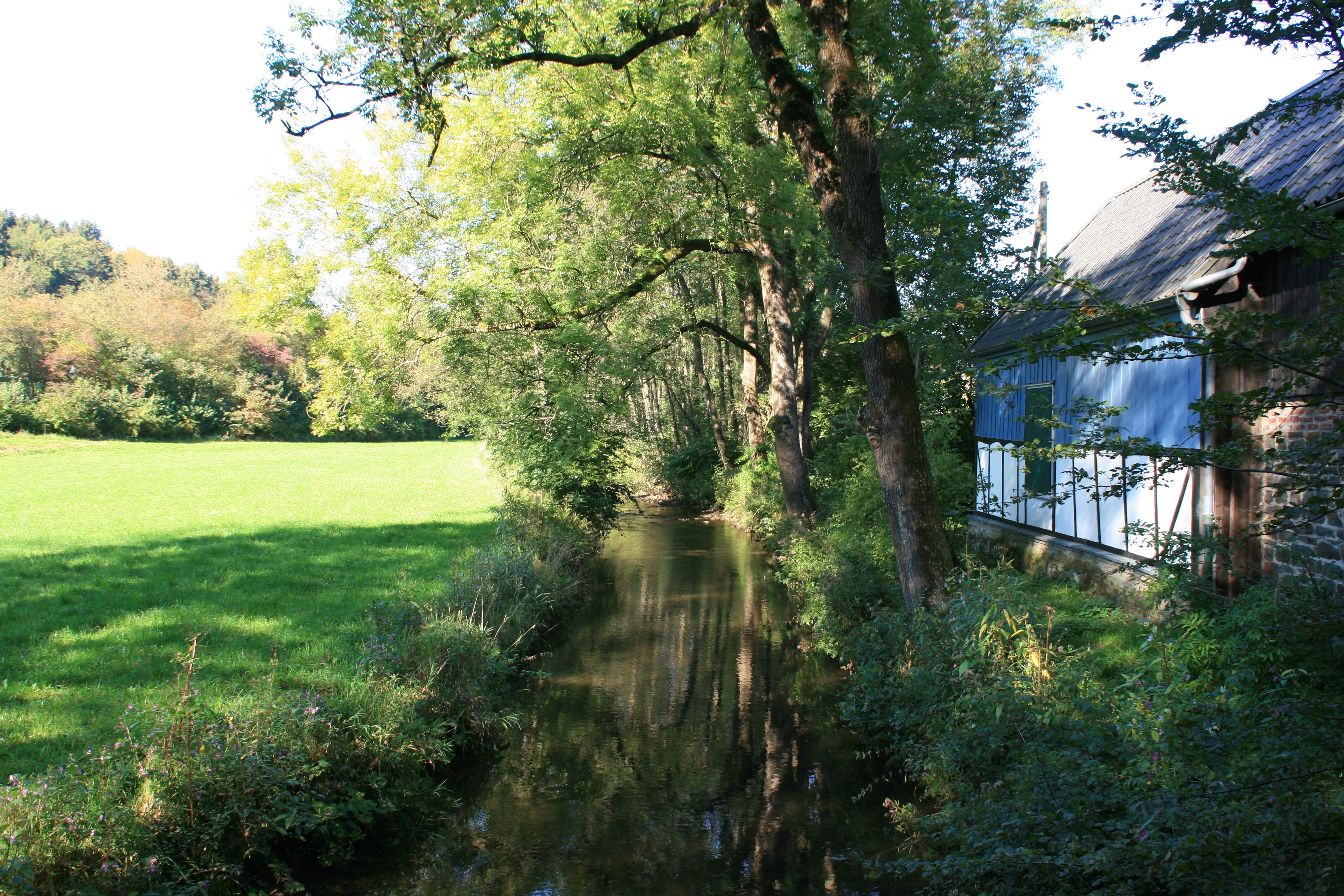 Die Leppe am Oelchensweg in Bickenbach, Engelskirchen